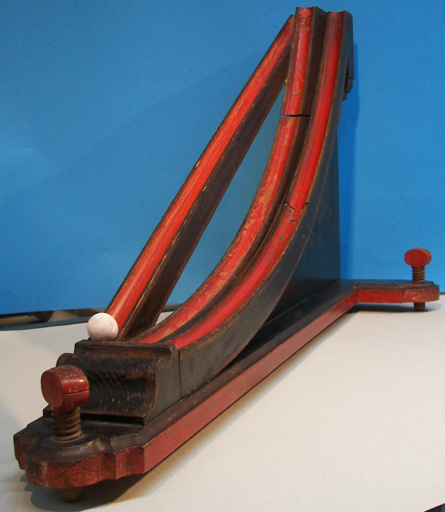 La gouttière cycloïdale par Sigaud de Lafond (1730-1810)